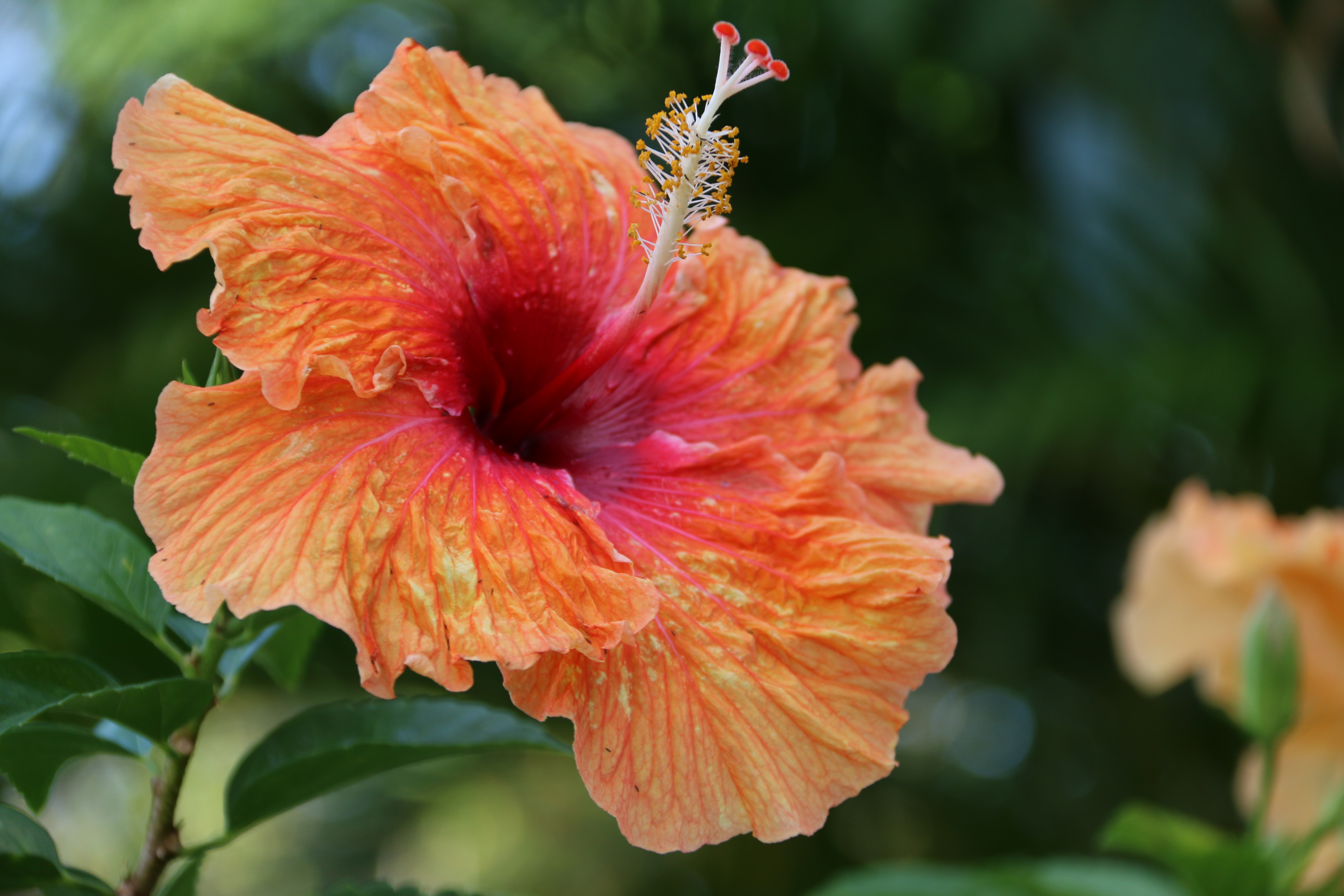 Genre de plantes à fleurs annuelles ou vivaces qui comporte plusieurs centaines d'espèces.